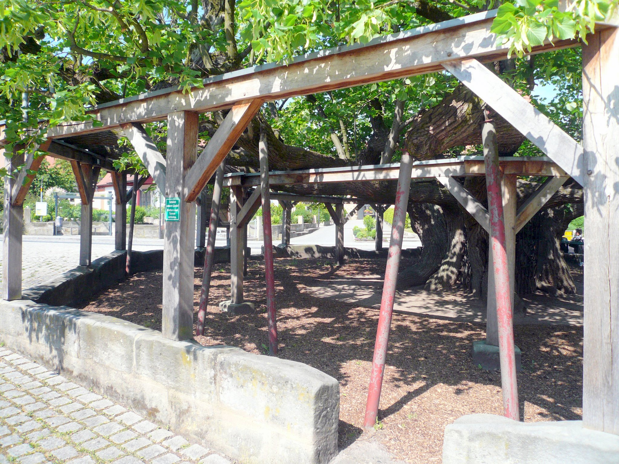 Tanzlinde in Effeltrich